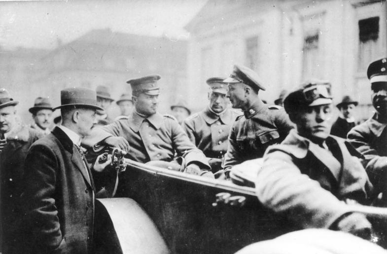 Title: Berlin, Kapp-Putsch, Kapitän Ehrhardt People in the image: Ehrhardt, Hermann: Korvettenkapitän, kaiserliche Marine, Deutschland (GND 118819860) Additional information: Fotografie von Robert Sennecke[1] Factual corrections and alternative descriptions are encouraged separately from the original description. Additionally errors can be reported at this page to inform the Bundesarchiv. Original historic description: ADN-ZB/Archiv Konterrevolutionärer Kapp-Putsch vom 13.-17.3.1920 in Berlin Die etwa 5.000 Mann starke Marinebrigade II unter dem Befehl von Kapitän Hermann Ehrhardt marschiert, aus Döberitz kommend, in den frühen Morgenstunden des 13. März in Berlin ein. Die Brigade bildet die militärische Stoßkraft des von Wolfgang Kapp und General Walther von Lüttwitz geführten Putsches. Kapitän Ehrhardt (links, im Auto sitzend) beim Einmarsch der Marinebrigade am 13. März in Berlin. 12289-24 [Scherl Bilderdienst]